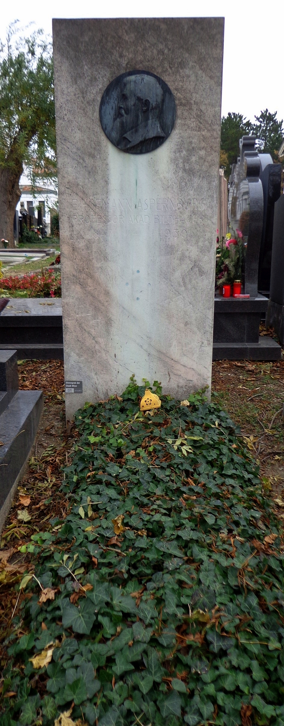 Wiener Zentralfriedhof - Gruppe 12A: Ehrengrab von Edmund Paul Andreas Hofmann von Aspernburg